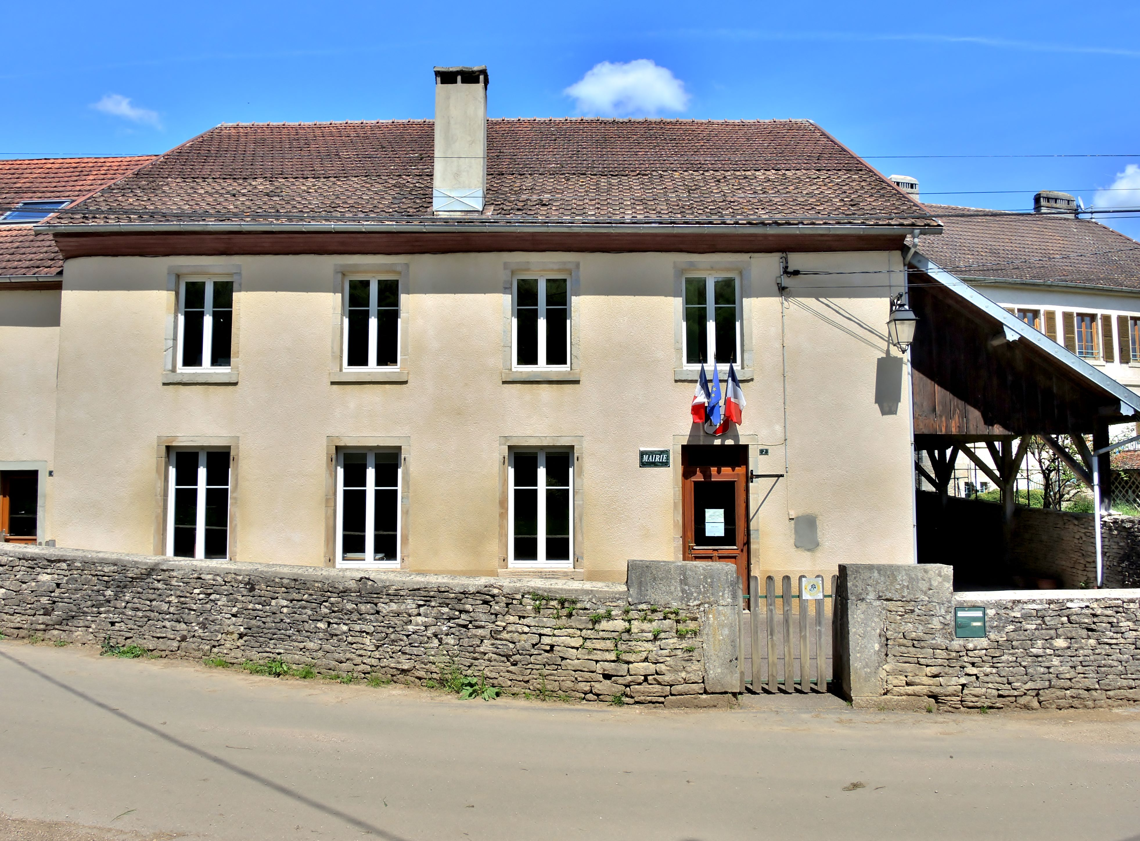 Mairie du village de Vauclusotte. Doubs